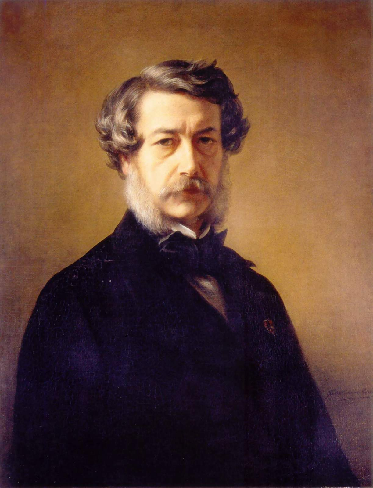 Winterhalter auto-portrait 1868